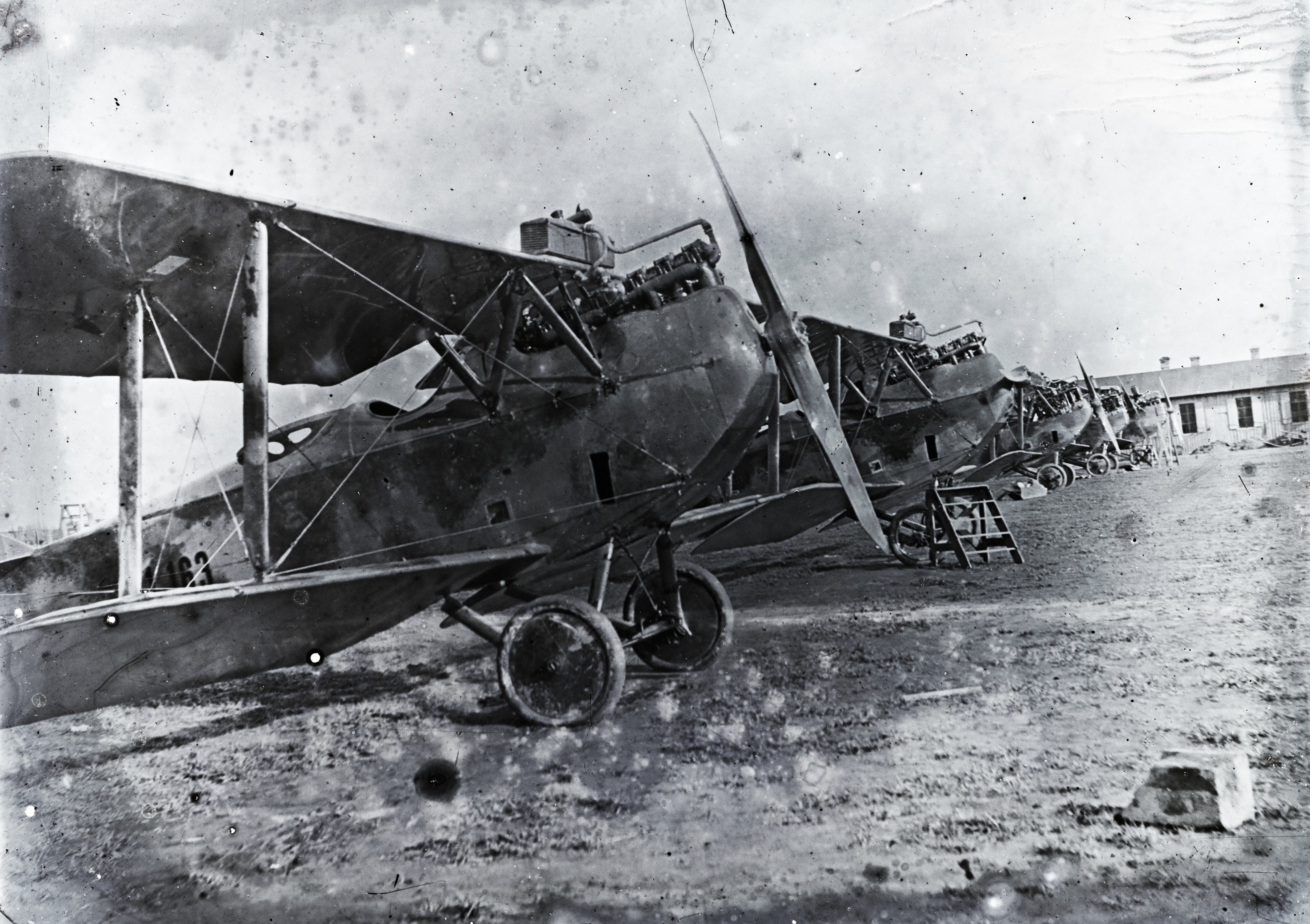 UFAG C.I típusú repülőgépek sora. Leltári jelzet: 698.